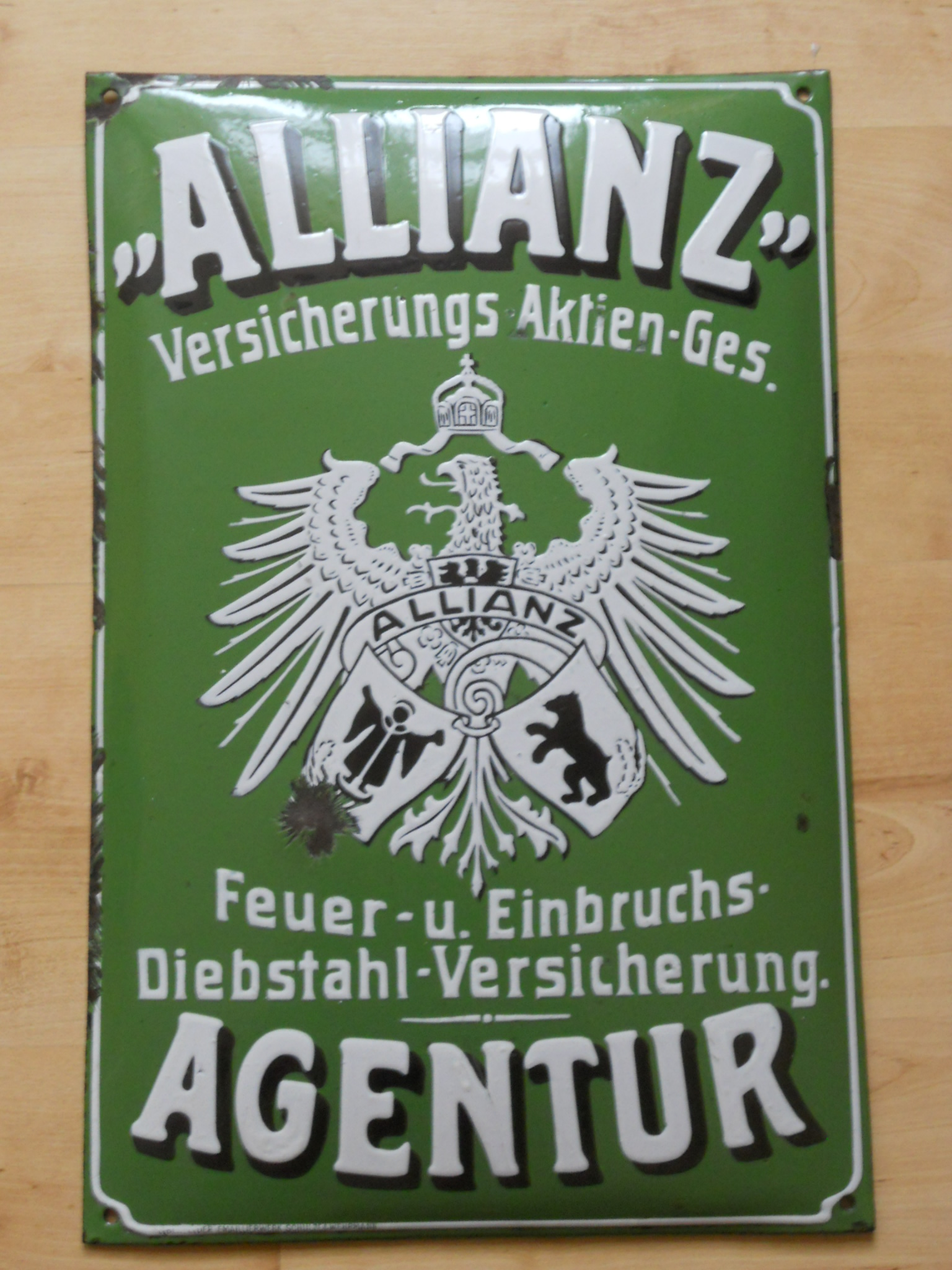 gewölbtes Emailleschild um 1900 der Allianz